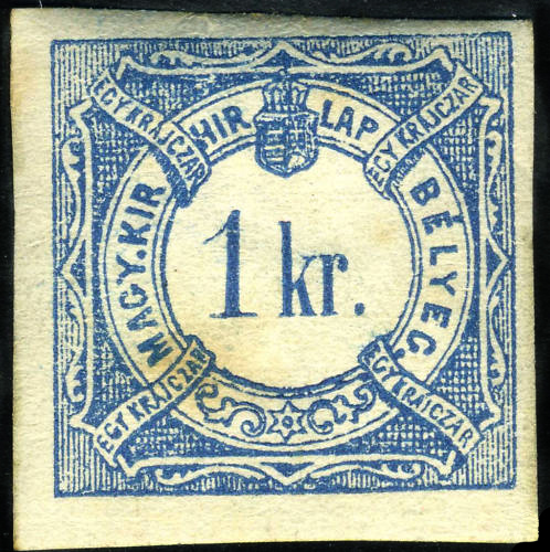 Первая газетная марка Венгрии, 1868